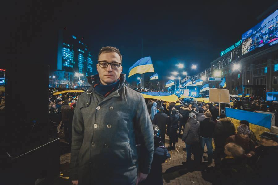 Олексій Рябчин на проукраїнському мітингу в Донецьку